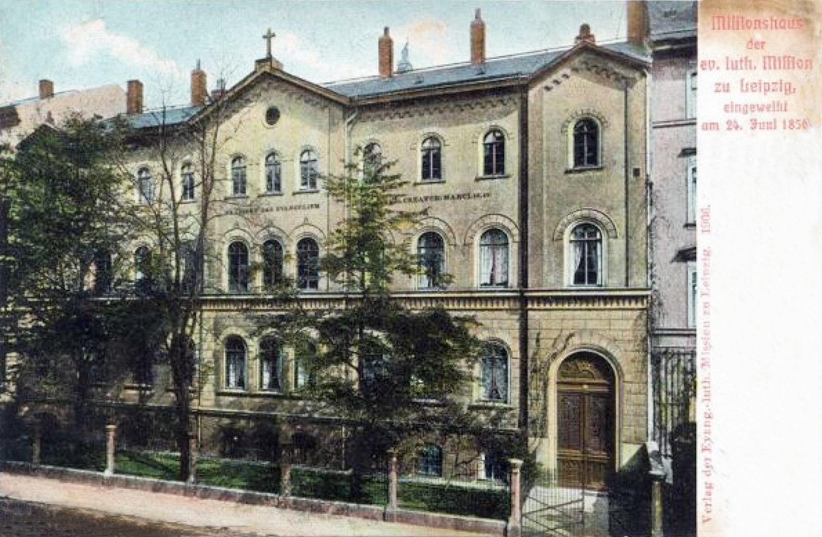 Missionshaus des Leipziger Missionswerkes, Postkarte von 1906